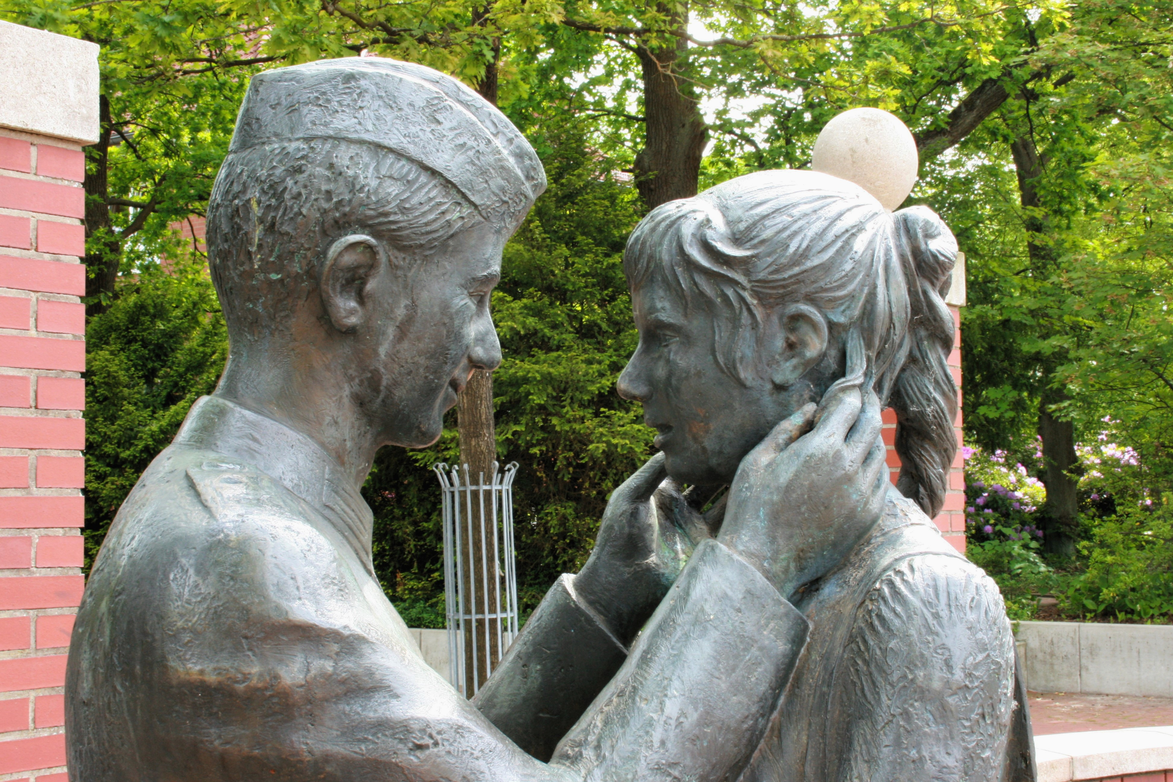 Lili-Marleen-Gruppe von Claus Homfeld auf der Wilhelm-Bockelmann-Straße in Munster (Örtze)